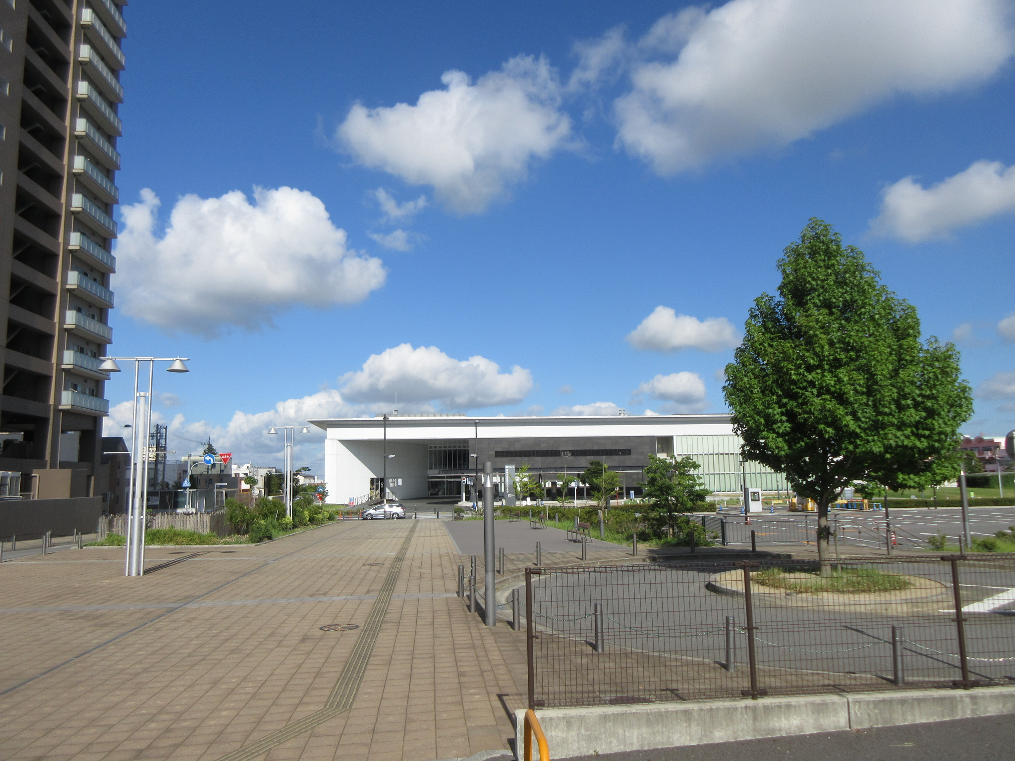 岡崎市図書館交流プラザ、岡崎タワーレジデンス